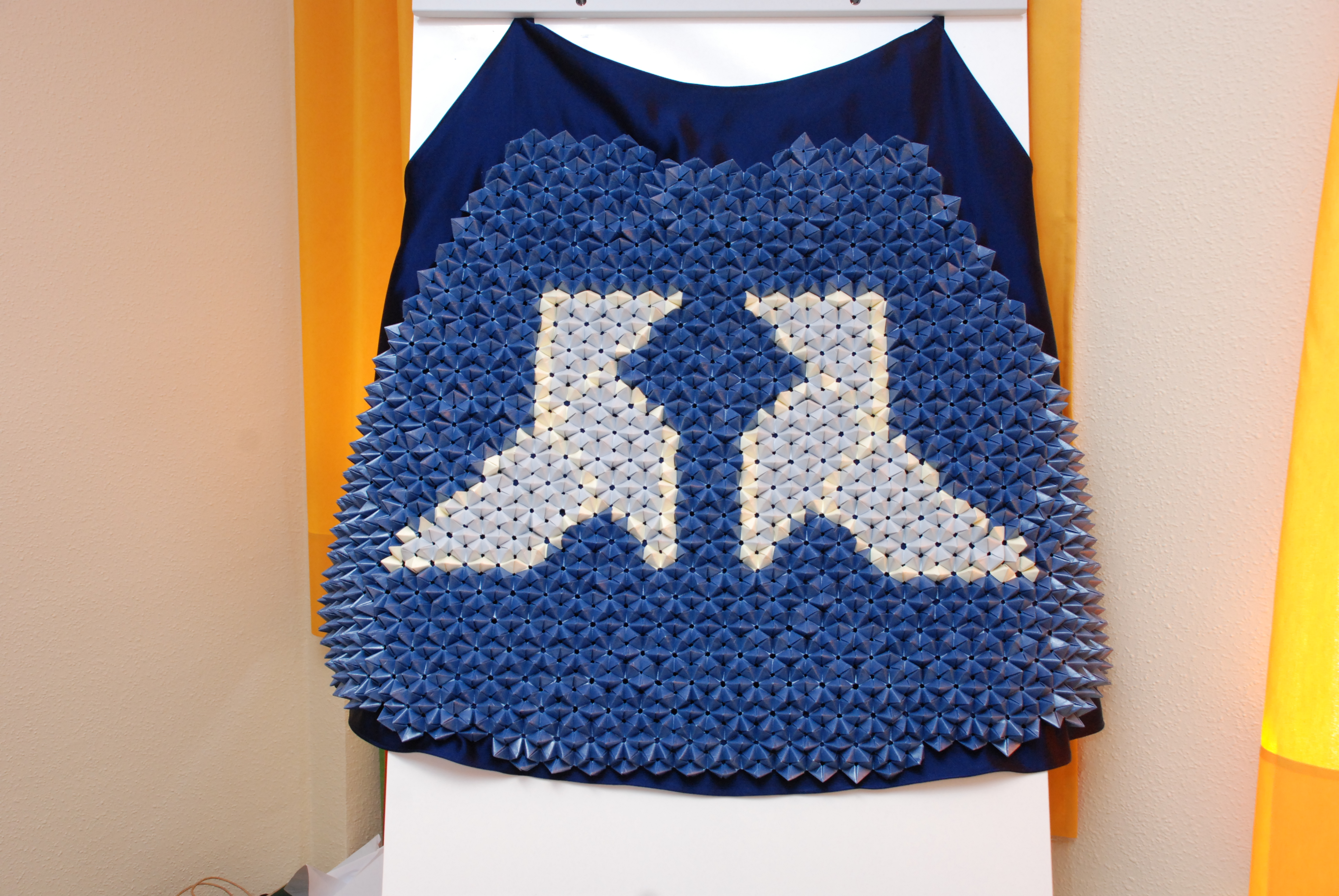 Manto hecho con 1536 piezas de papel para la Virgen del Pilar